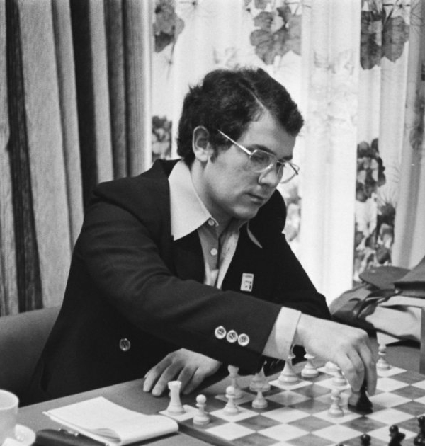 Hoogovenschaaktoernooi, Wijk aan Zee 1977 ; Kurajica.